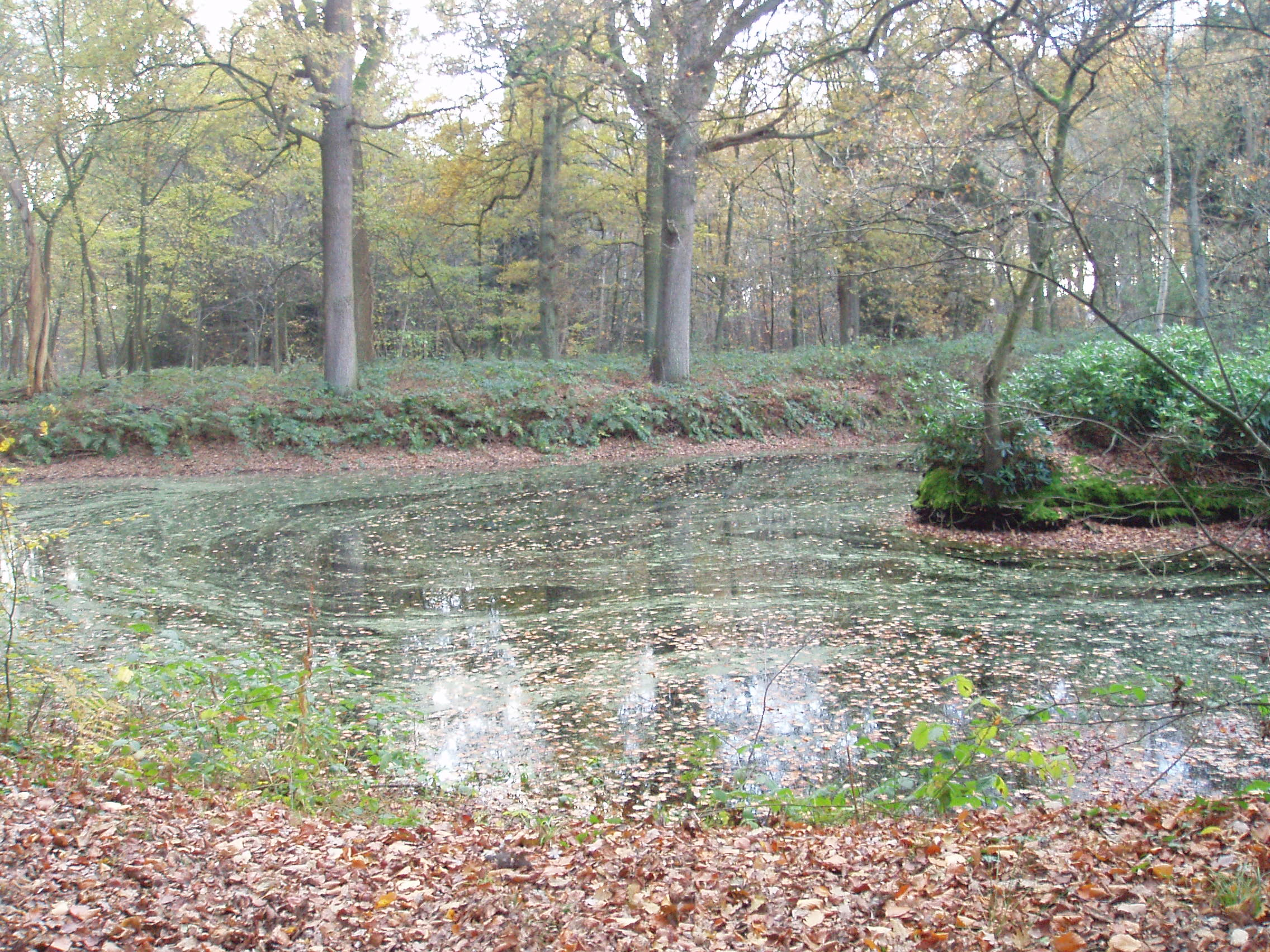 Water in het park De Renesse